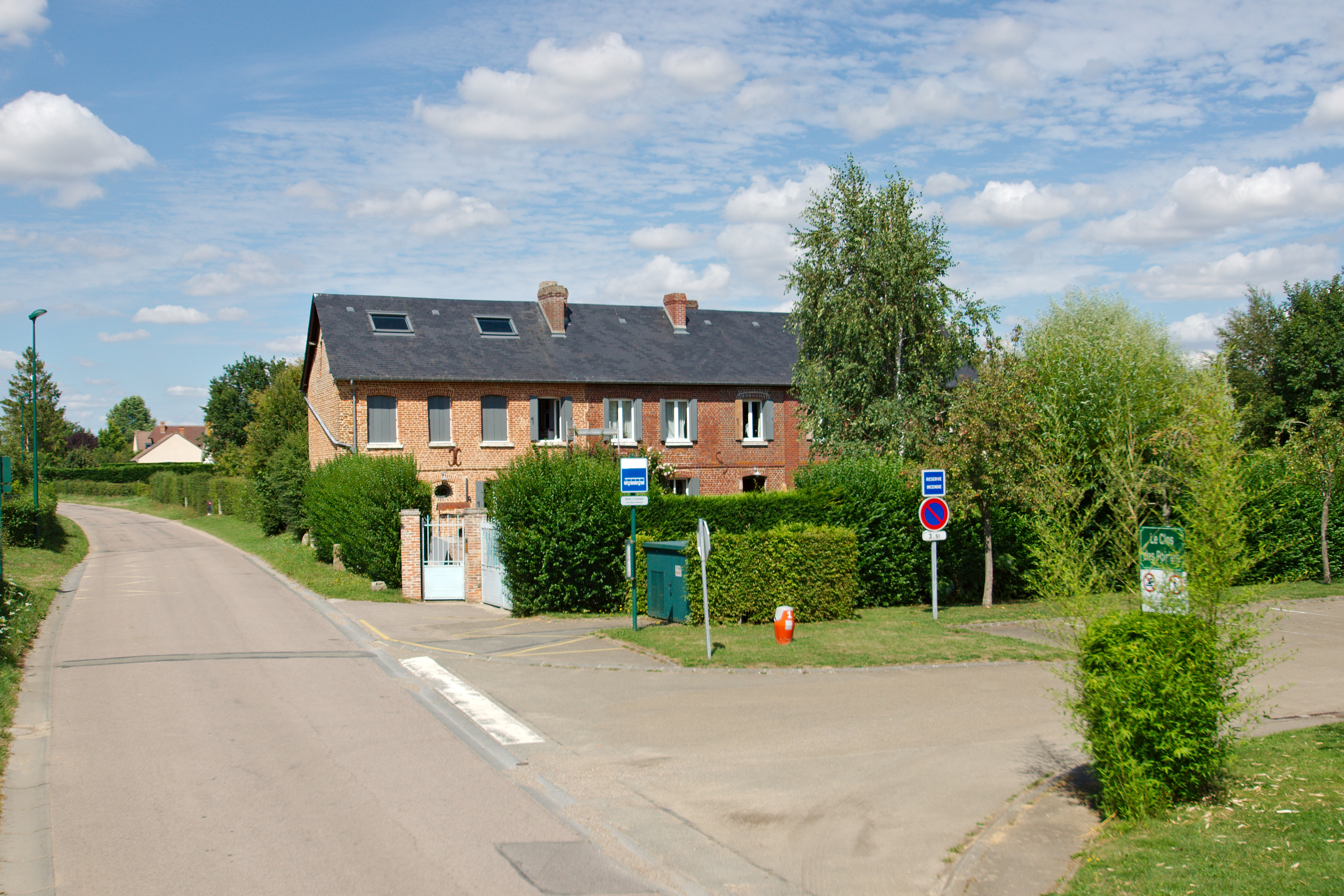 Maison en brique rose du 18e siècle rue Principale à Bois-l’Évêque